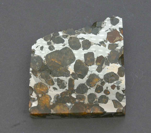 Stein-Eisenmeteorit Pallasit Brahin